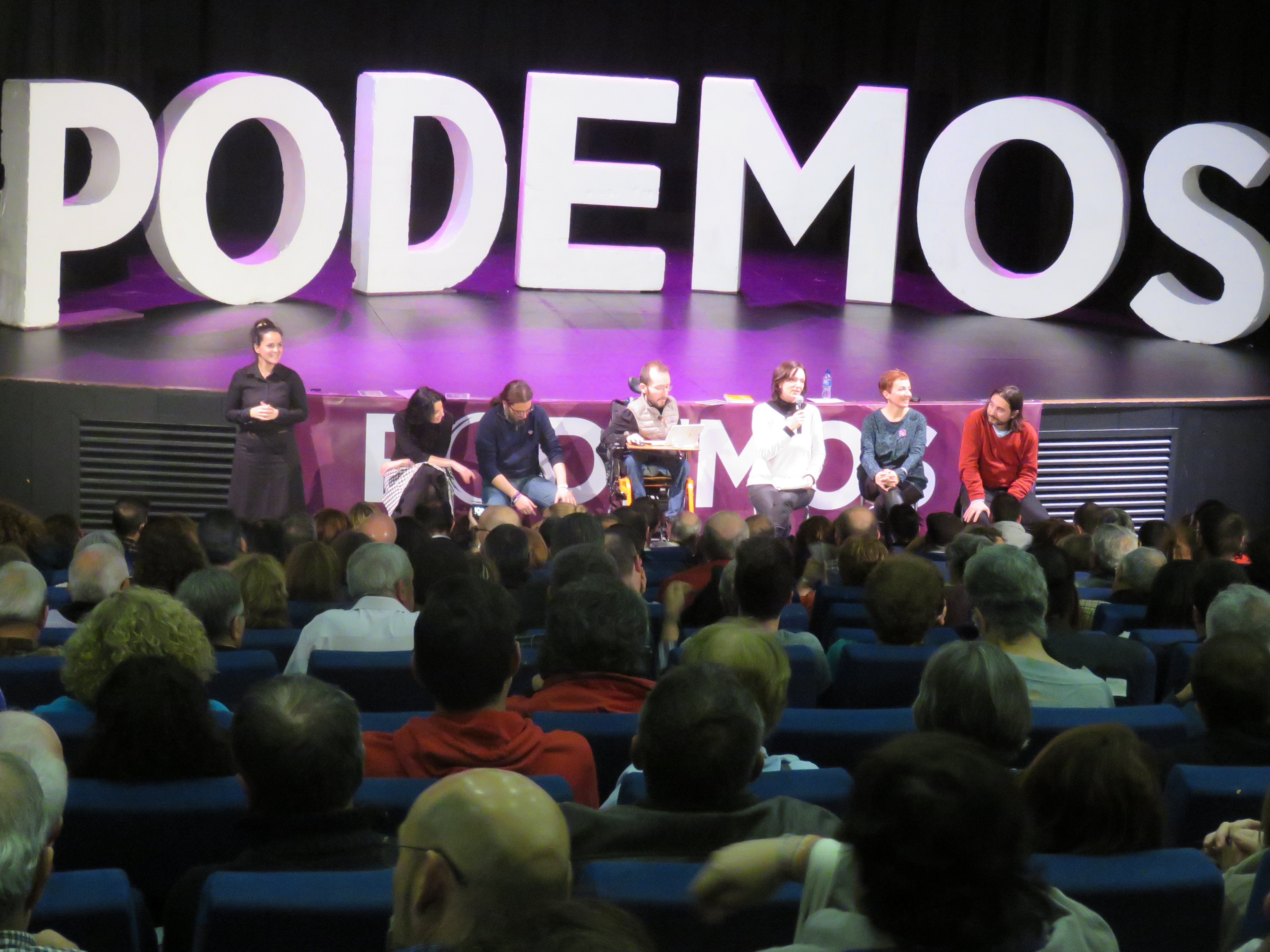 Imagen tomada en el Acto de Campaña del partido político español Podemos en San Fernando de Henares (Madrid) a pocos días de las elecciones generales del 20 de diciembre de 2015.